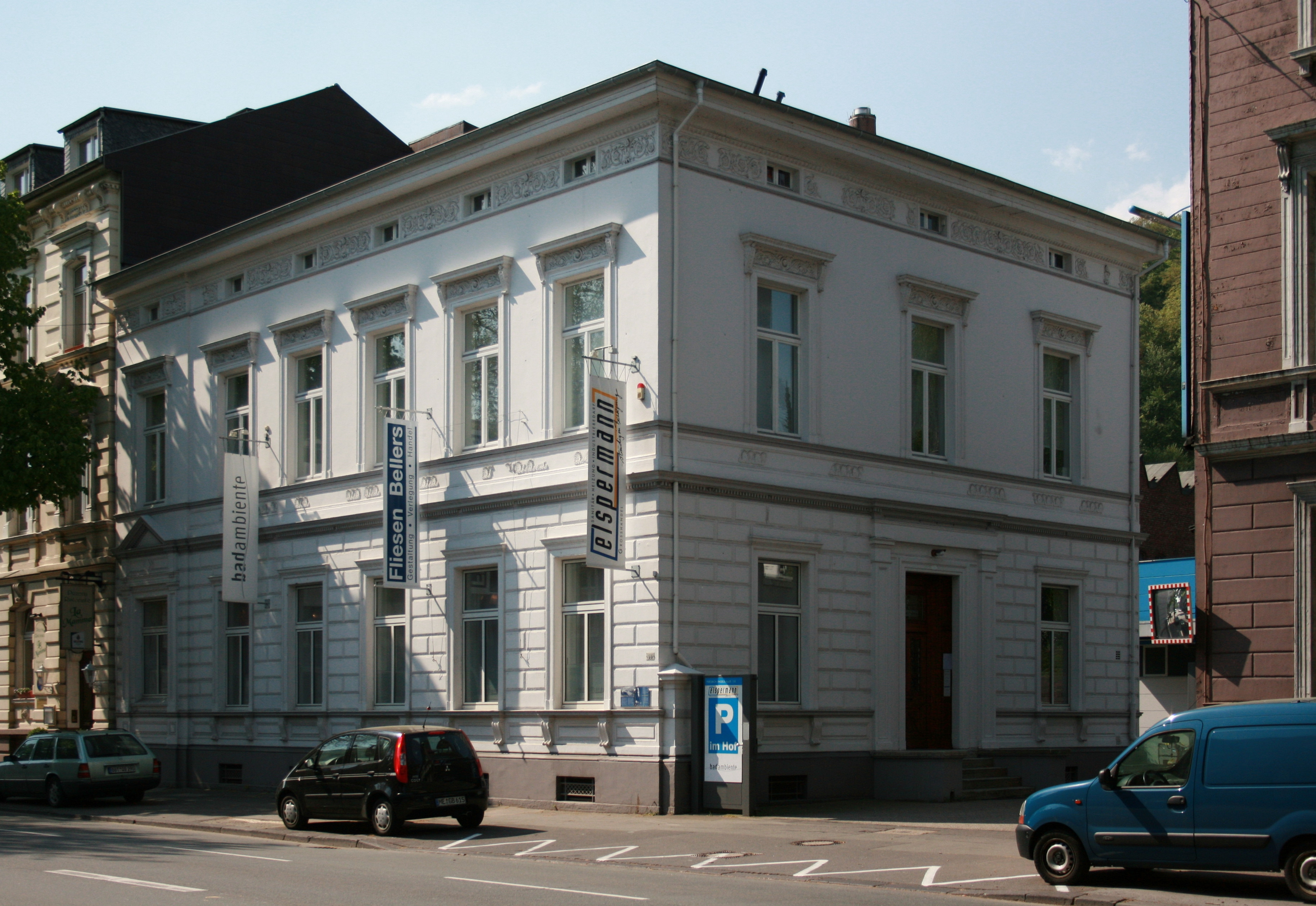 Friedrich-Engels-Allee 155 in Wuppertal